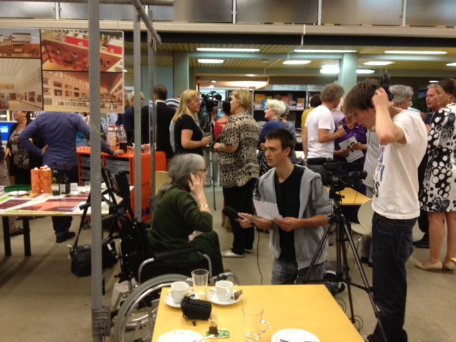 tienda de apertura de la biblioteca